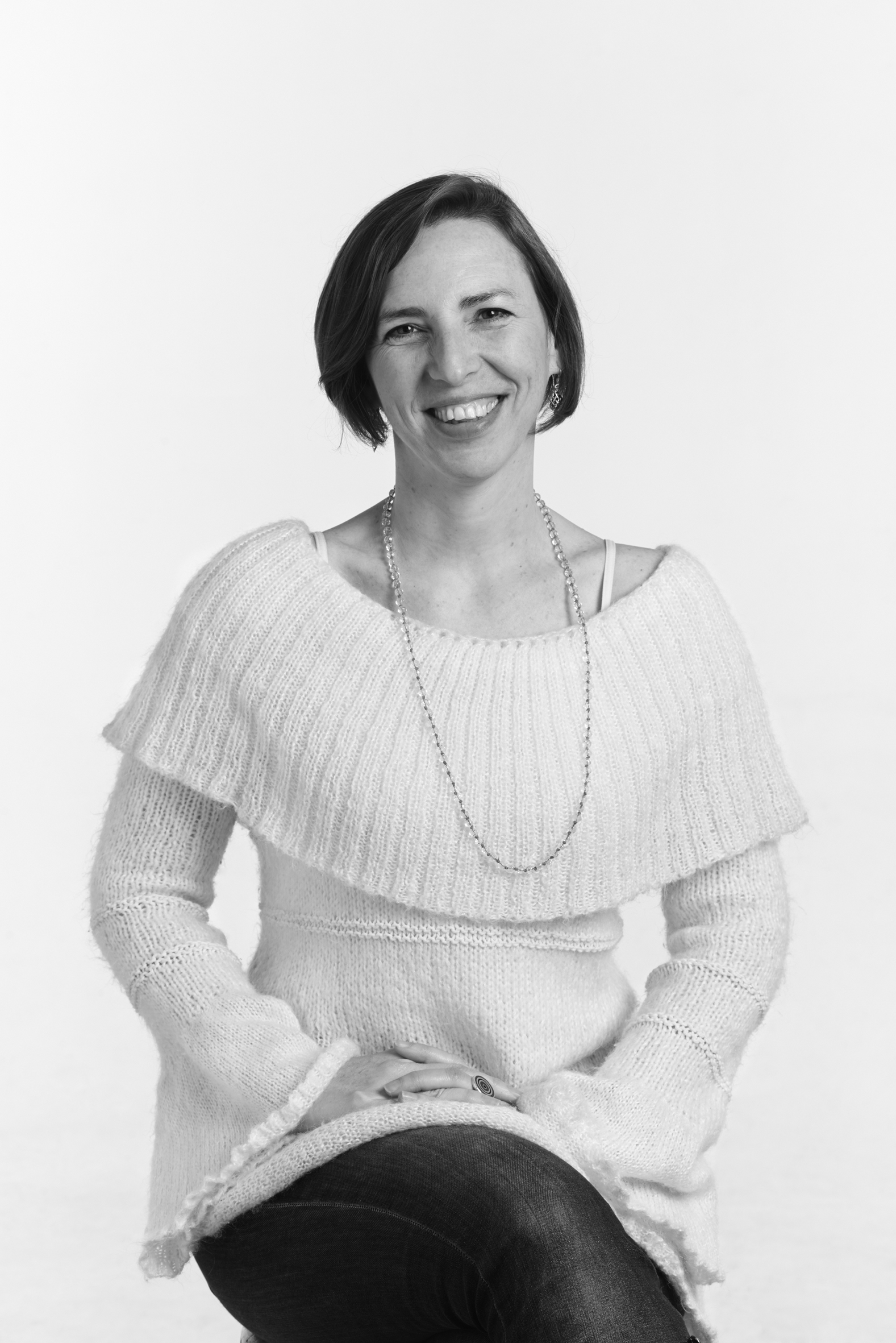 Fotografía realizada por el fotógrafo Néstor Pereira.